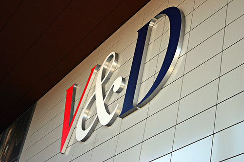 Vroom & Dreesmann logo